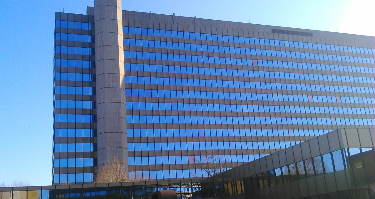 ZDF Hochhaus, vom Sendebetriebsgebäude aus gesehen